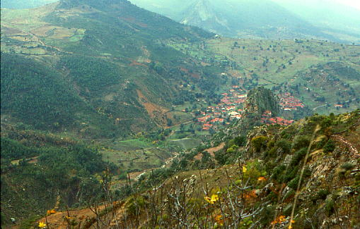 Dans le Djurdjura (Kabylie), Algérie